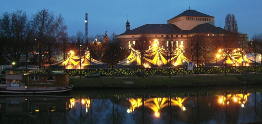 Saarbrücken: Uferanlage mit Circus Flic-Flac in der Mörgendämmerung